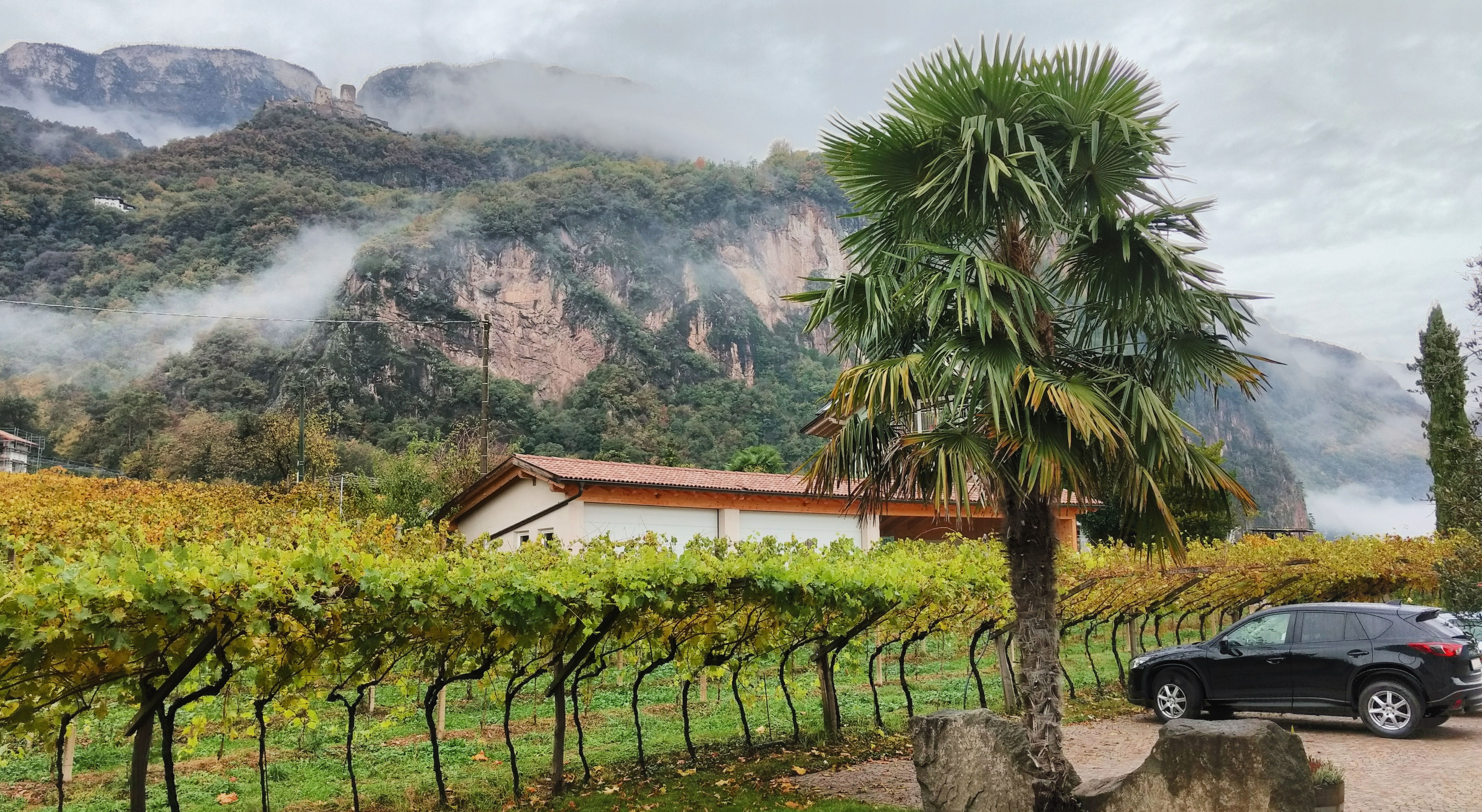 Ausblick auf ein paar der Burger St. Pauls (Eppan); Foto aufgenommen im November 2018